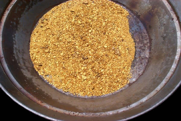 Тарелка с золотым песком